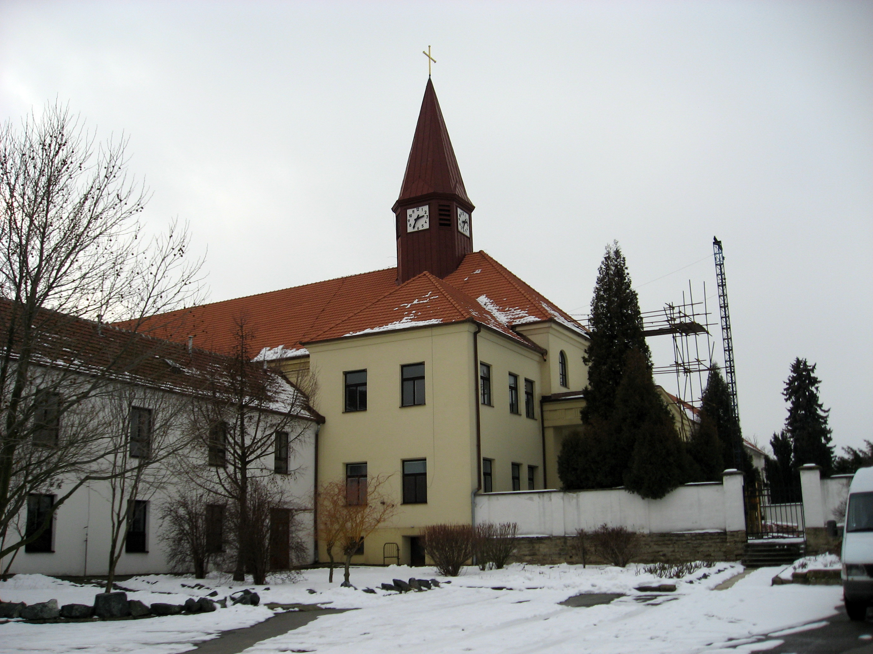 Rajhrad, klášter Těšitelek